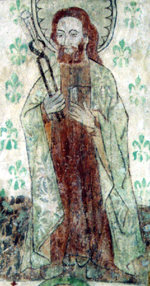 Manlig Apollonia i Sånga kyrka